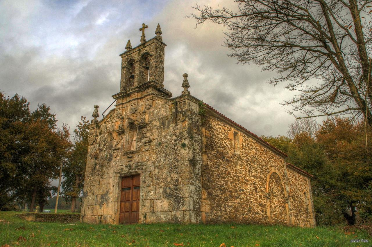 Capela da Virxe dos Remedios en Lamas, Noceda, Lalín